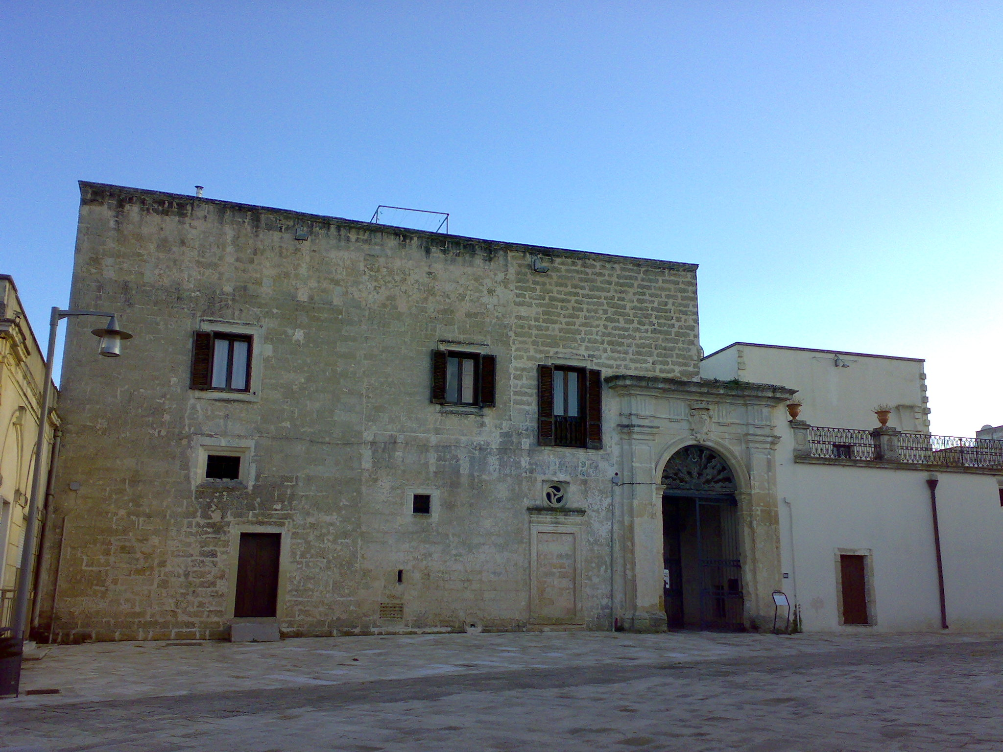 Palazzo Palmieri Martignano, provincia di Lecce